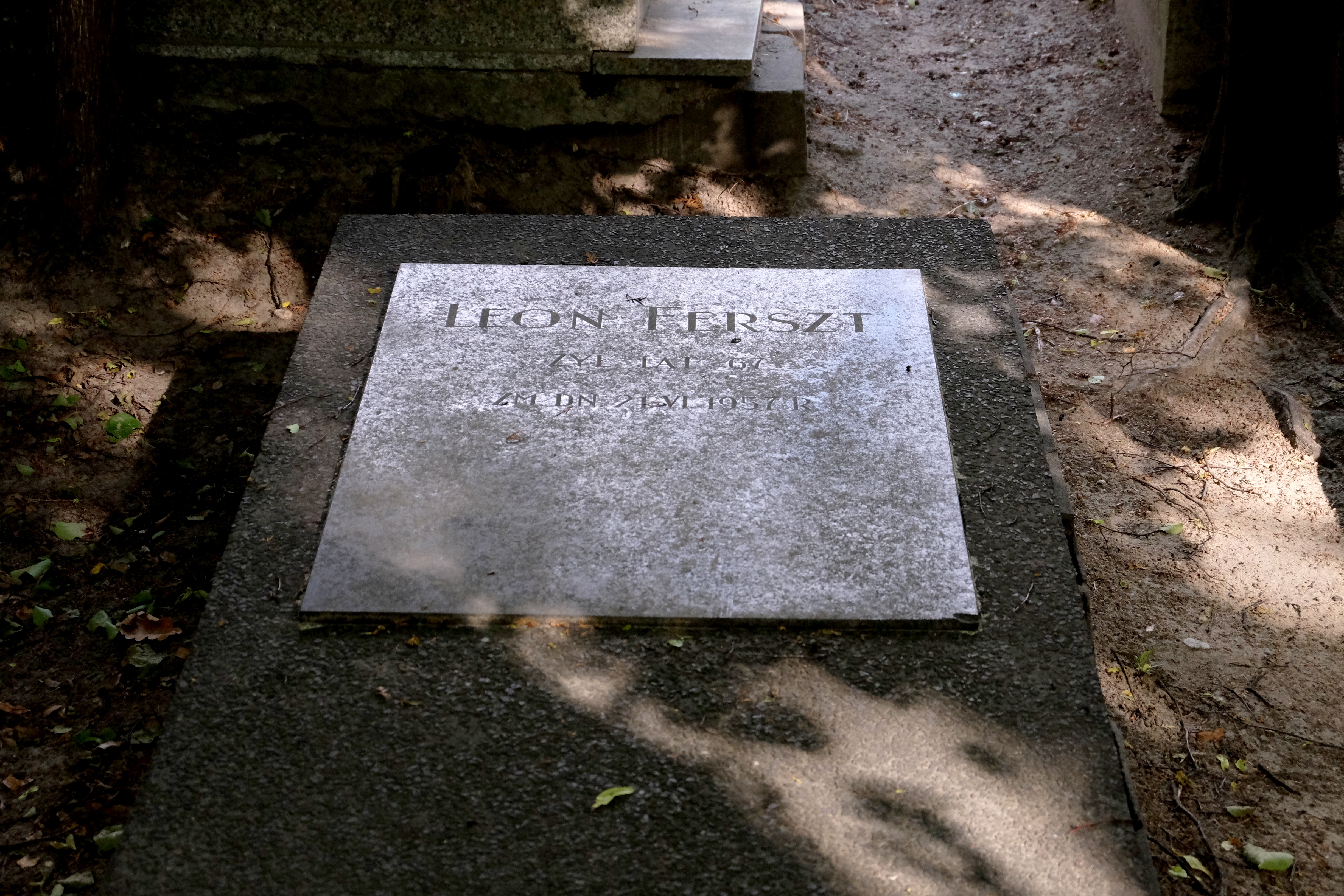 Grób działacza komunistycznego Leona Ferszta na Cmentarzu Wojskowym na Powązkach w Warszawie